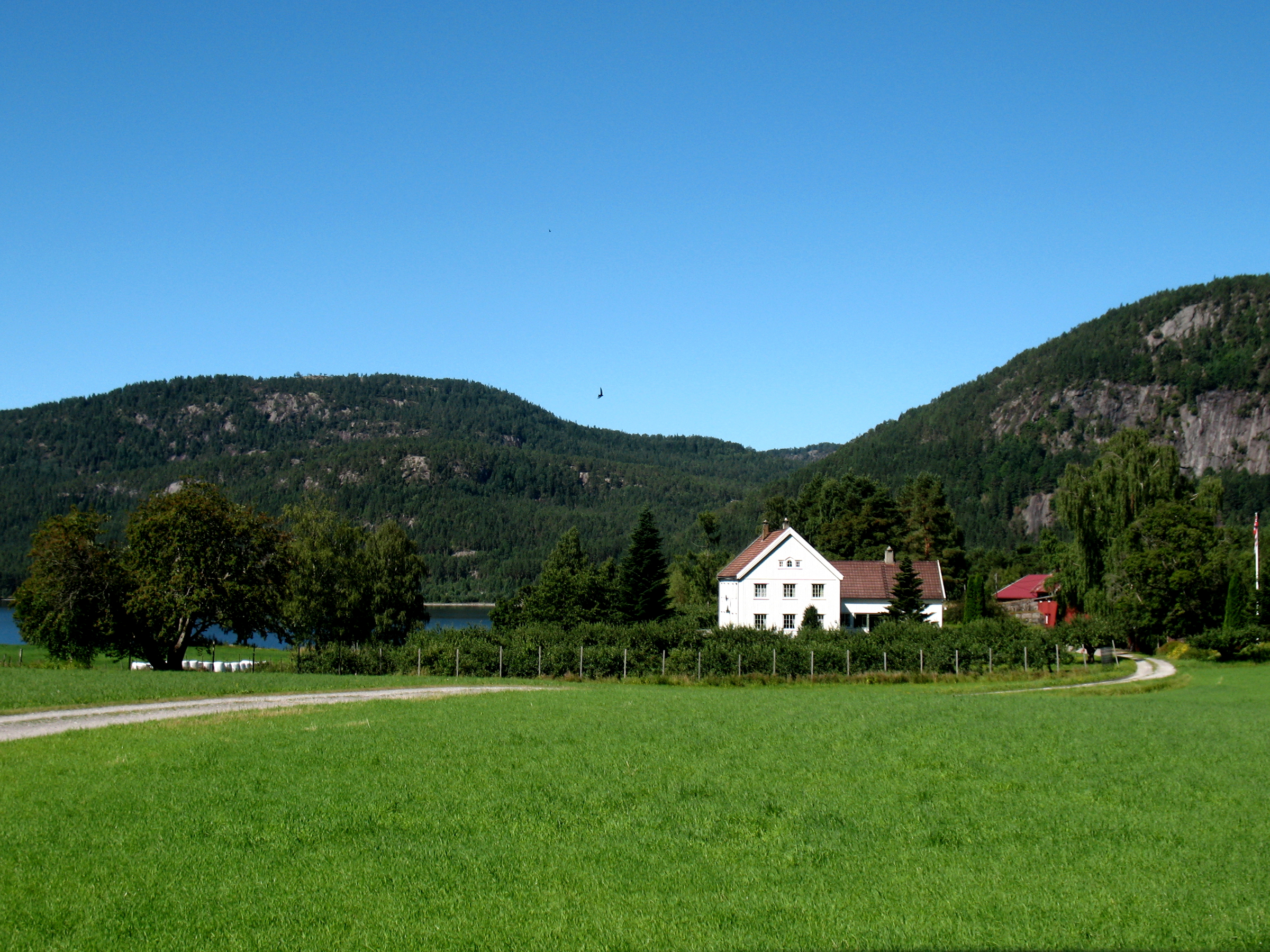 Garden Monen i bygda Longerak, Bygland kommune, Aust-Agder fylke. Gnr/bnr 54/2. Fjellet Frøyrakshorgji (Horgi) til høgre.